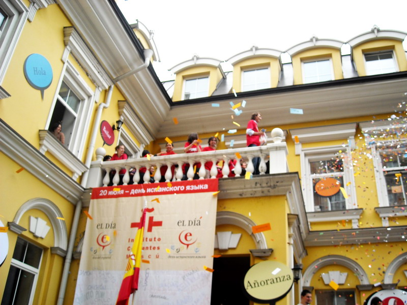 Из пушки выстрелили листовками со словами победителями голосования. 2009 год.